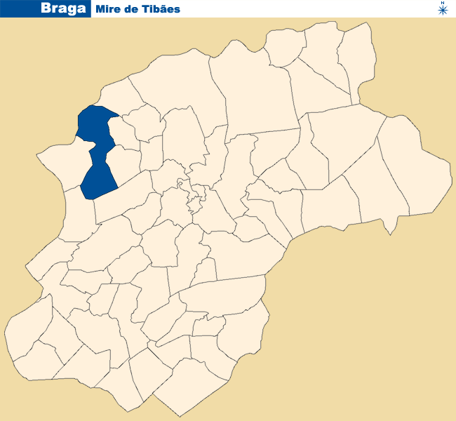 Localização de Mire de Tibães no concelho de Braga.